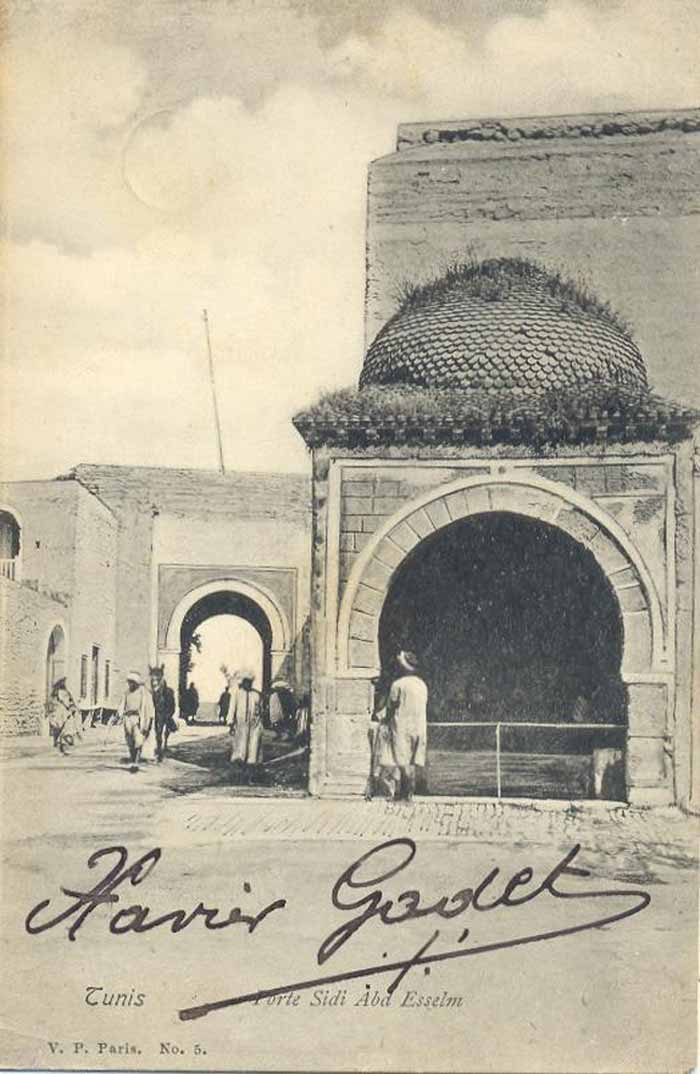 Tunis. Porte des faubourgs ouest.